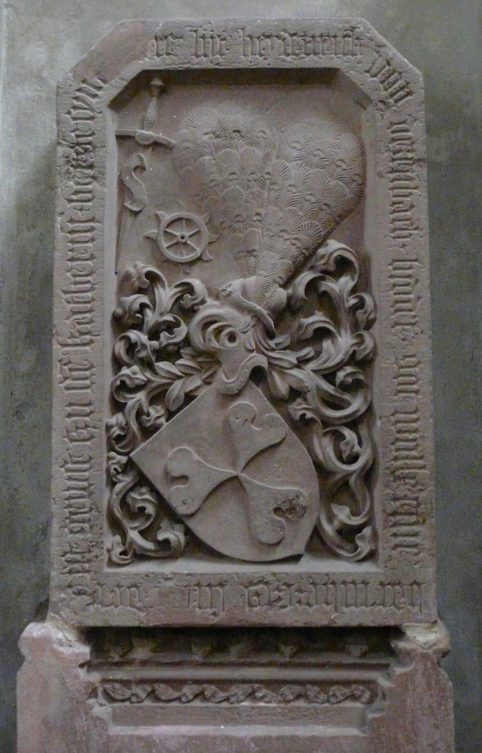 Epitaph von Heydenreich von Dernbach im Wetzlarer Dom, Wetzlar (Hessen)